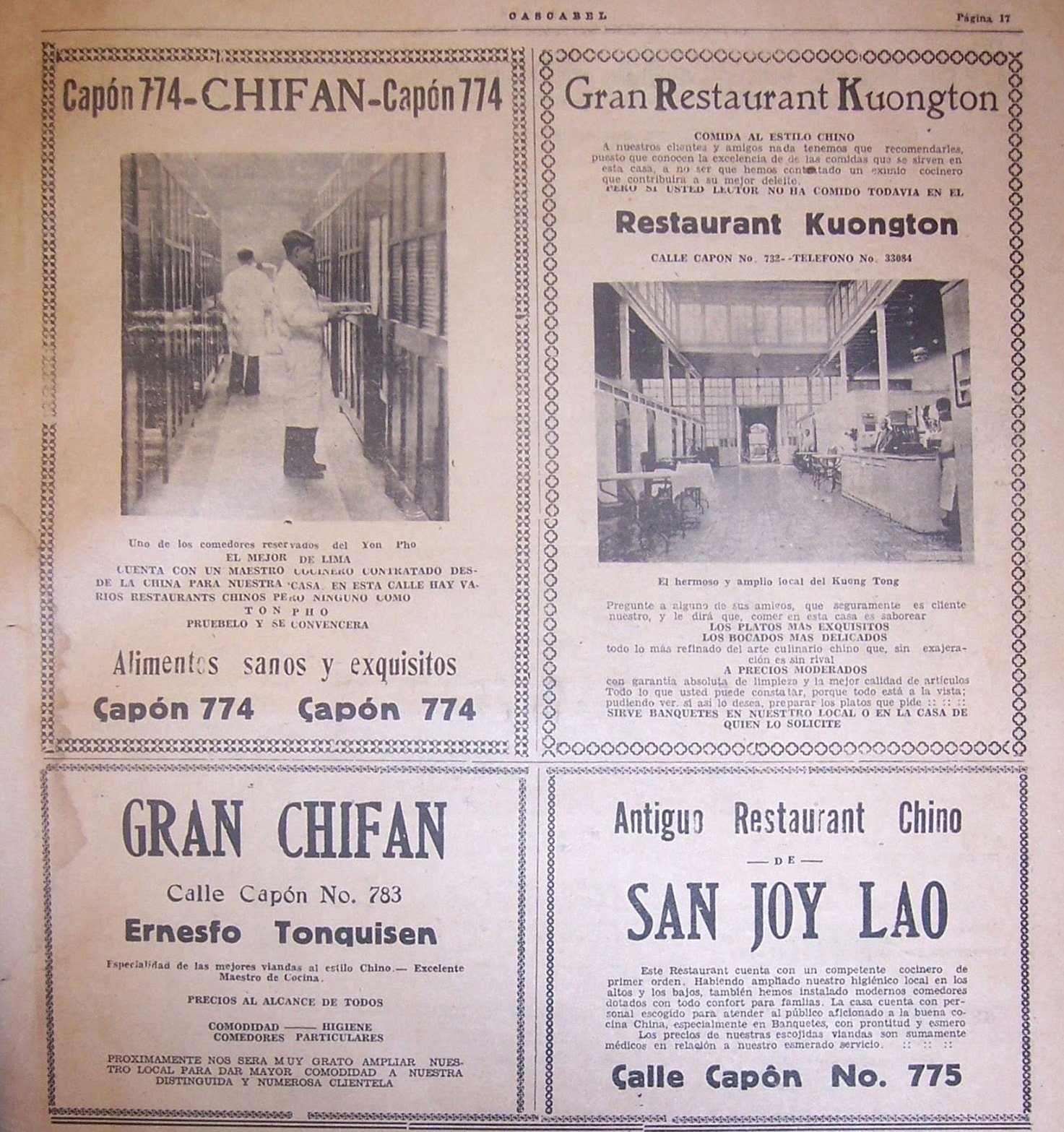 Anuncios de restaurantes chifas en la calle Capón de Lima: Chifán Ton Pho, Gran Restaurant Kuongton (o Kuong Tong), Gran Chifán Ernesto Tonquisen (o E. Tonqui Sen) y San Joy Lao. Aparecidos en la página 17 del número 39 de la revista Cascabel.